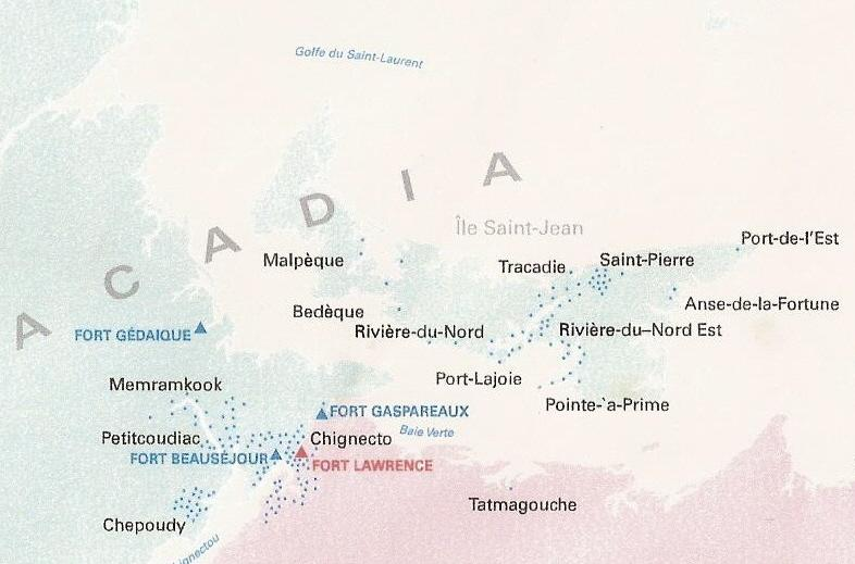 L'Isle Saint-Jean en 1750.